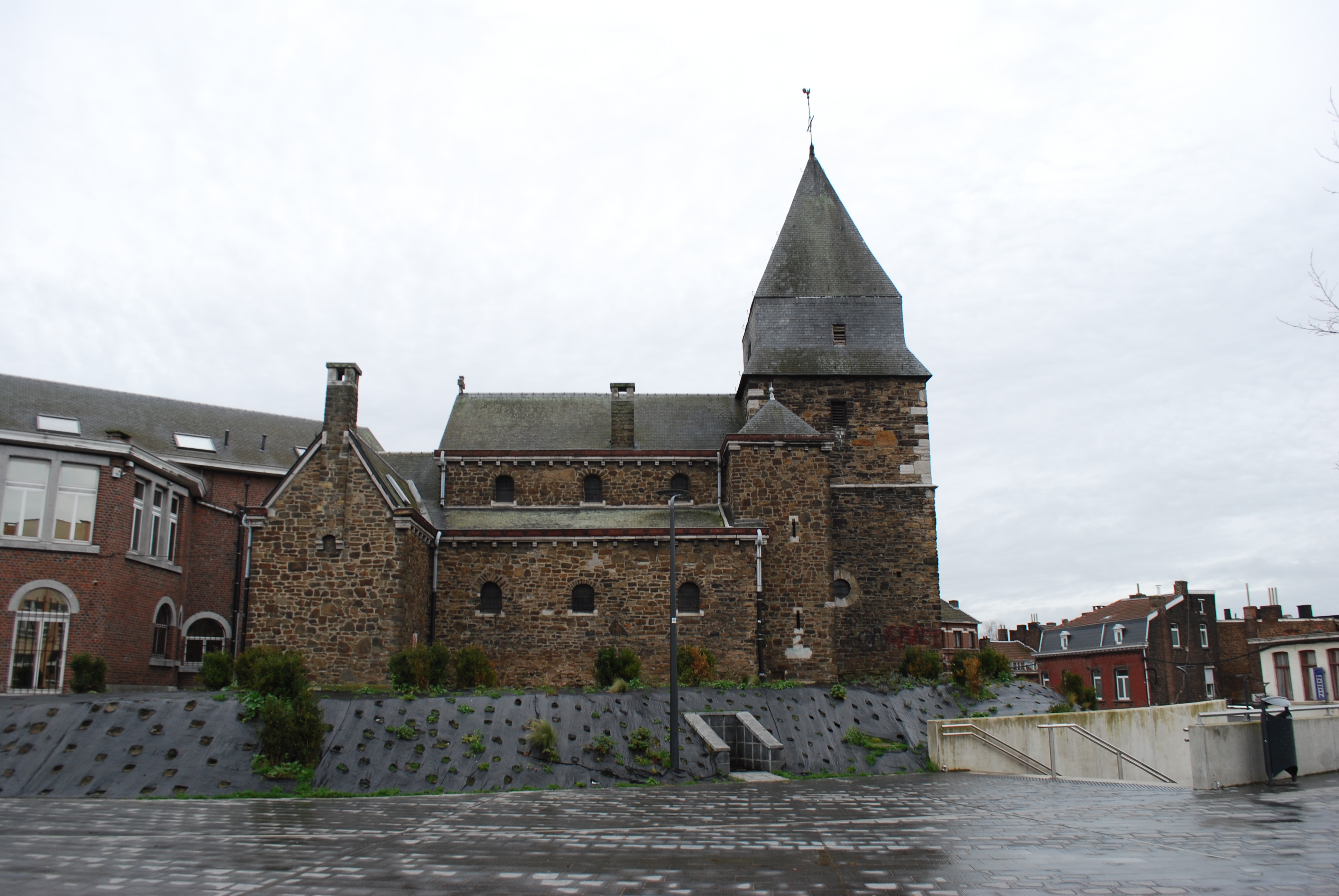 Vue de la place Jean Jaurès à Herstal.